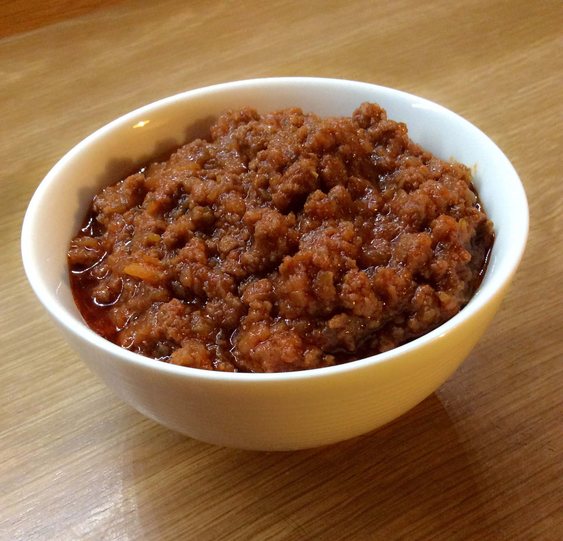 Ragù fatto in casa